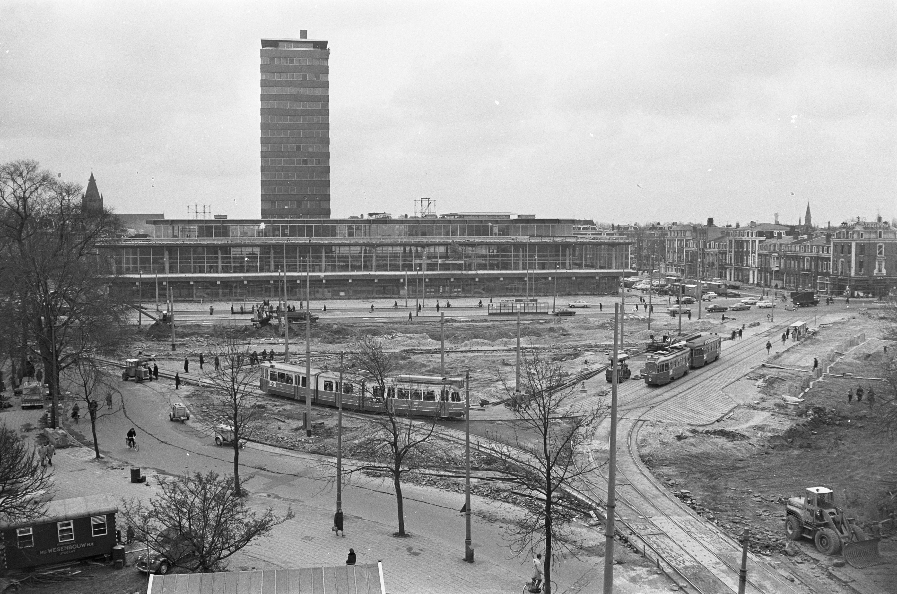 Collectie / Archief : Fotocollectie Anefo Reportage / Serie : [ onbekend ] Beschrijving : Overzicht Frederiksplein Datum : 4 april 1967 Trefwoorden : pleinen Fotograaf : Merk, Ben / Anefo Auteursrechthebbende : Nationaal Archief Materiaalsoort : Negatief (zwart/wit) Nummer archiefinventaris : bekijk toegang 2.24.01.05 Bestanddeelnummer : 920-2053